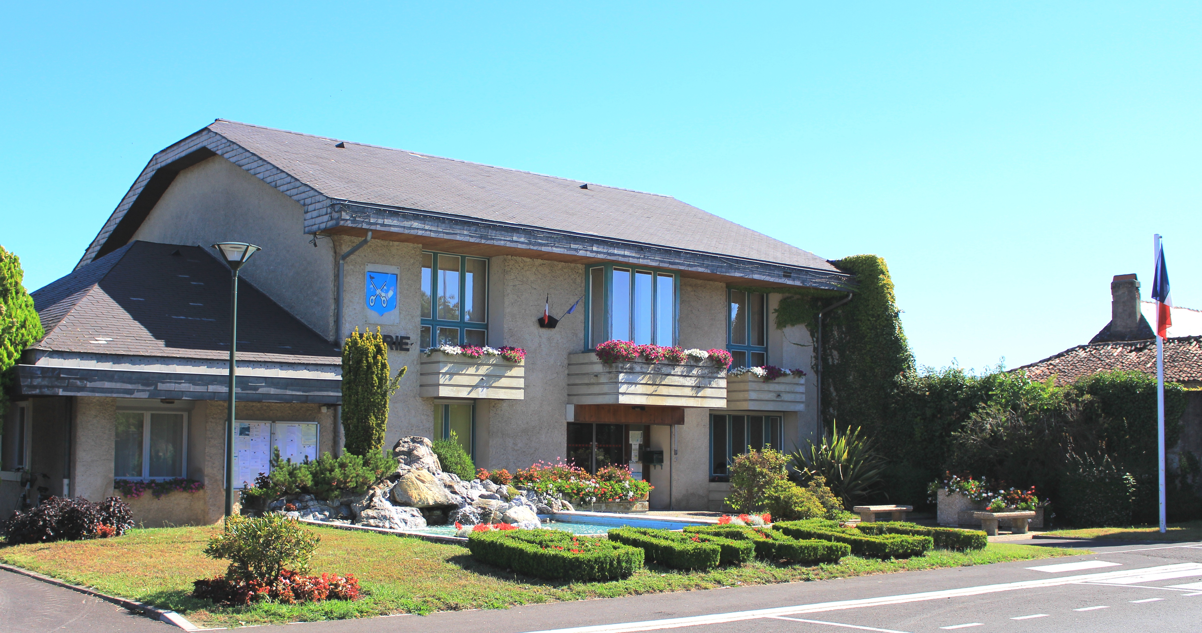 Mairie de Bazet (Hautes-Pyrénées)